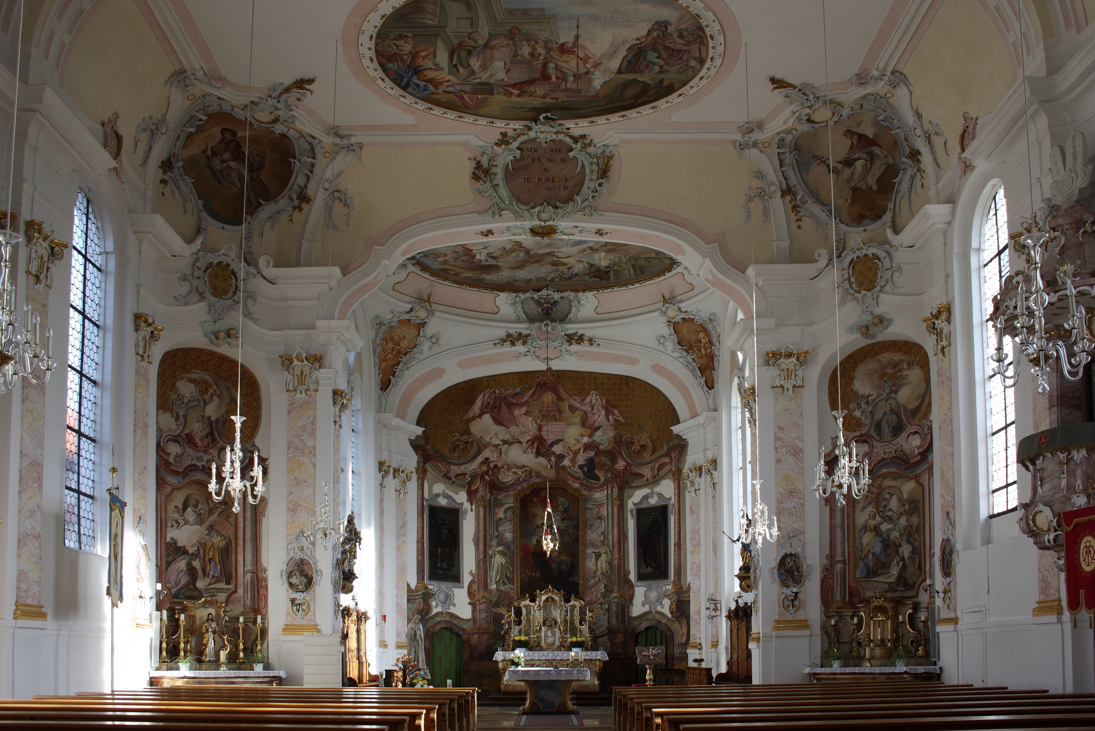 Katholische Pfarrkirche Mariä Himmelfahrt in Scheppach, einem Ortsteil von Jettingen-Scheppach im Landkreis Günzburg (Bayern), Innenraum